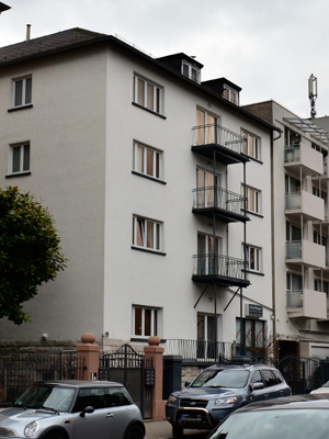 Haus Westendstr 92